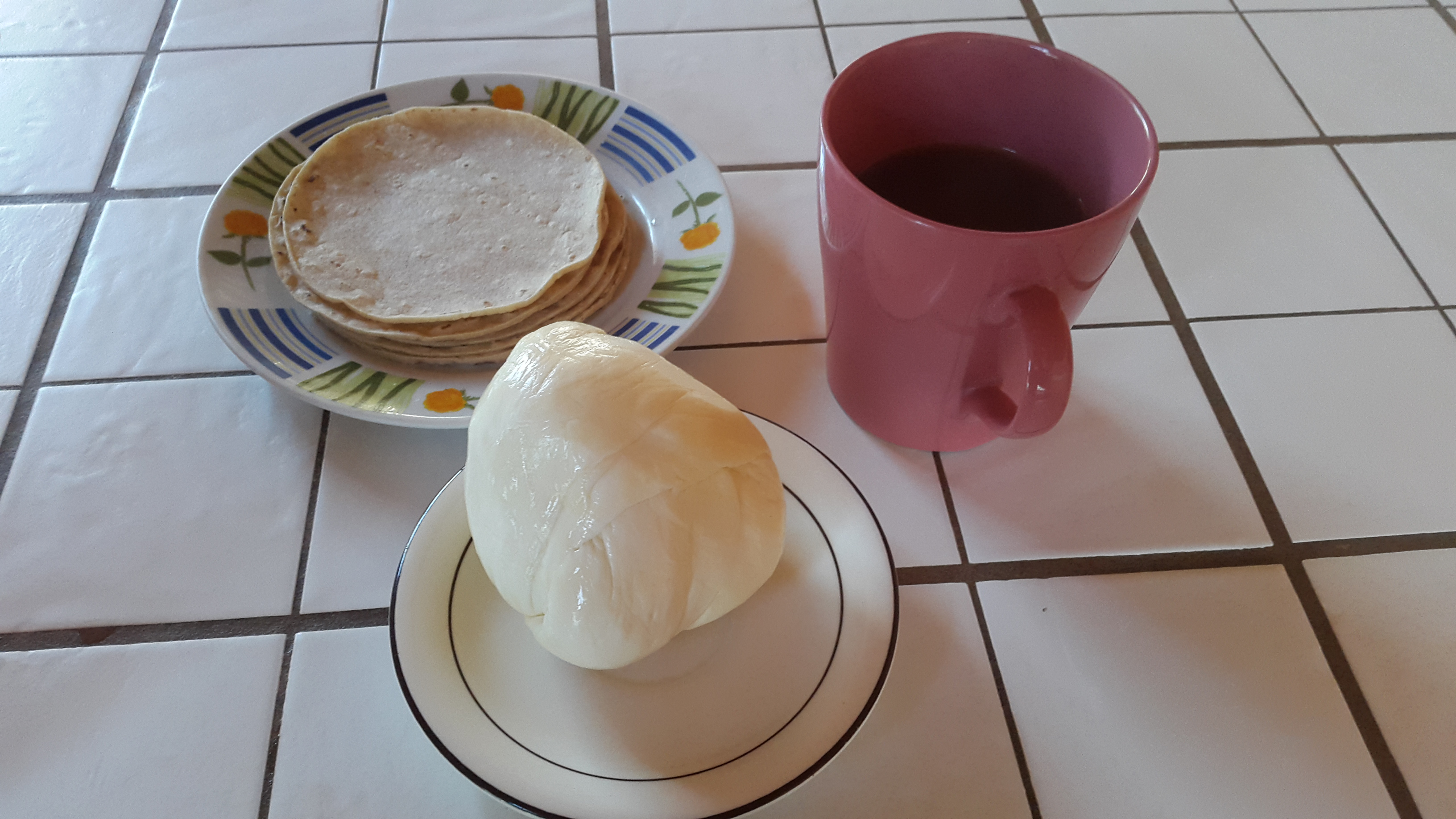 El queso palmito es un queso criollo de Costa Rica hecho a base de leche entera con pasta hilada. Usualmente se prepara en forma de esfera.